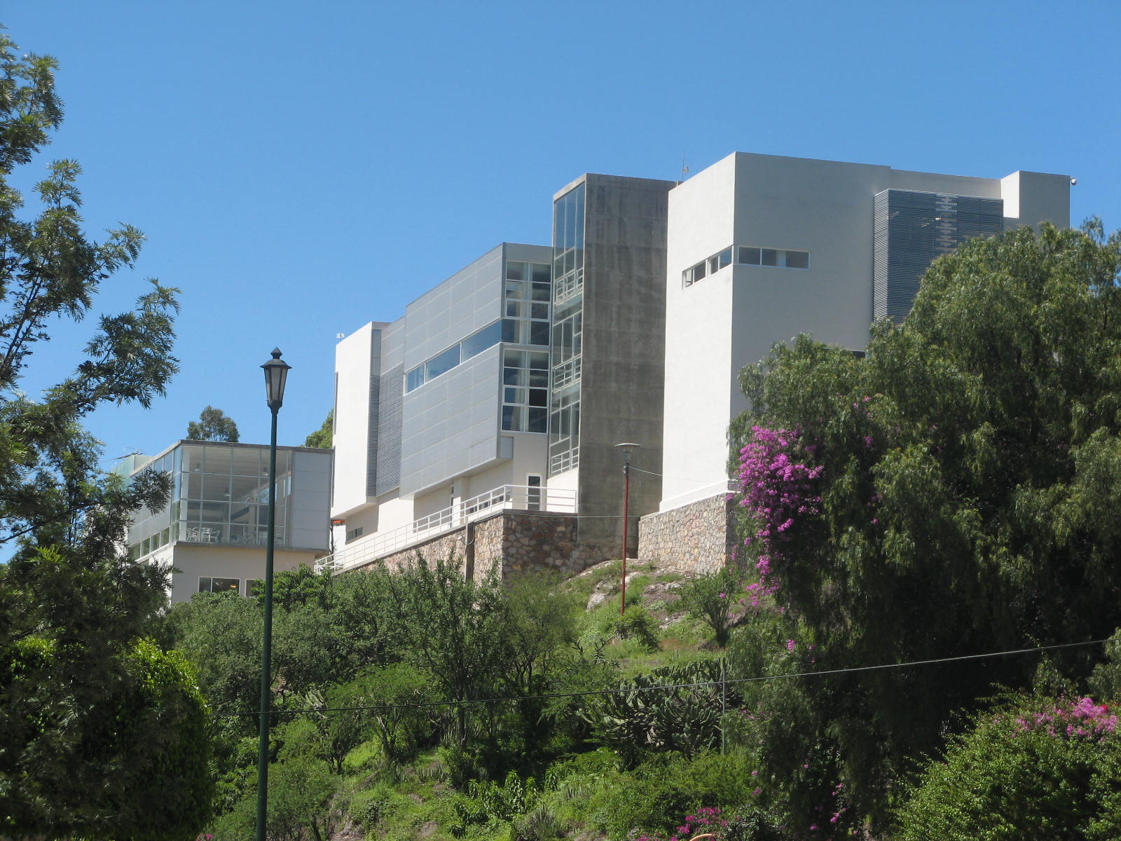 Biblioteca de la División de Ciencias de la Vida